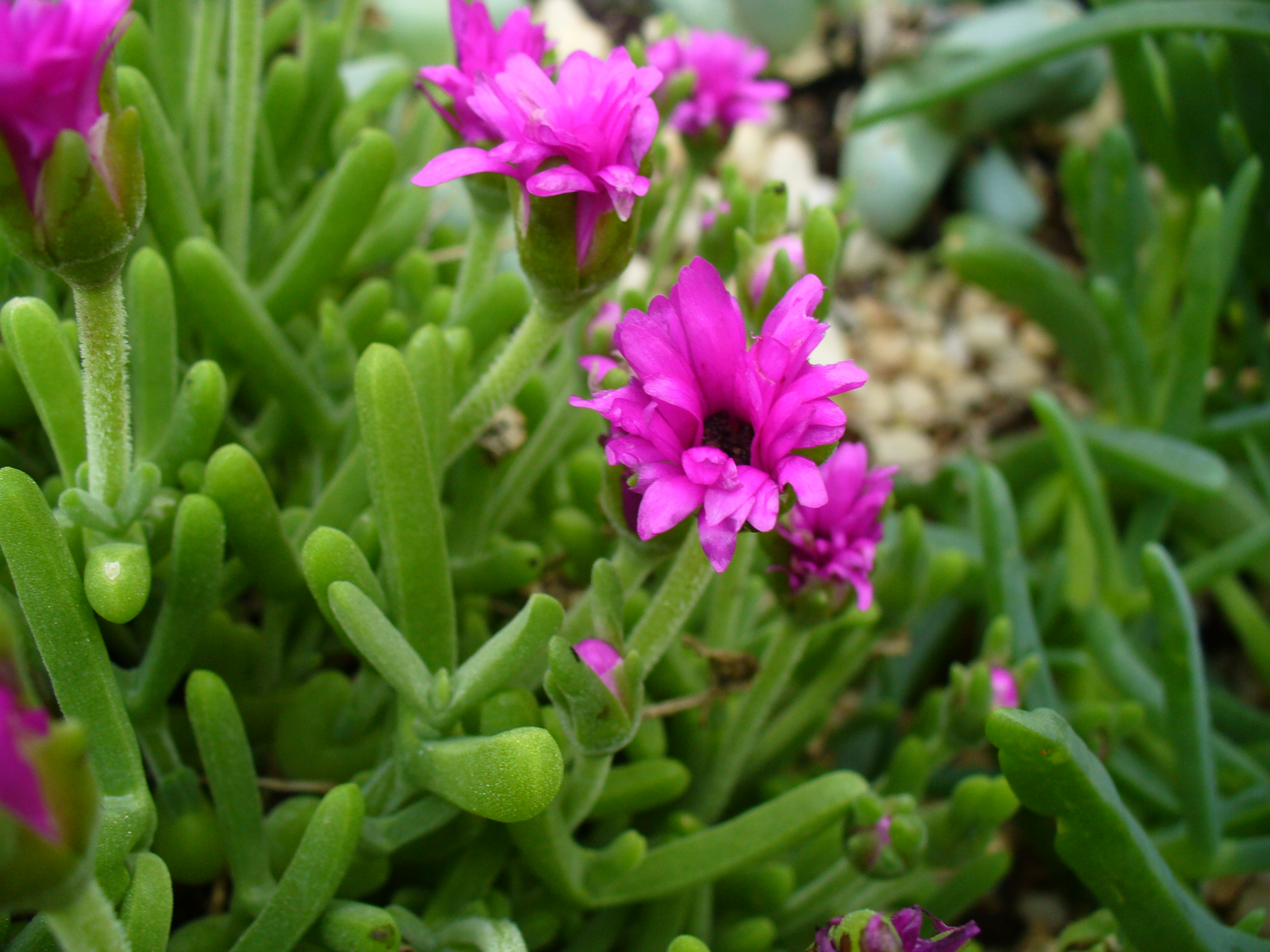 Kirstenbosch Gardens, Cape Town